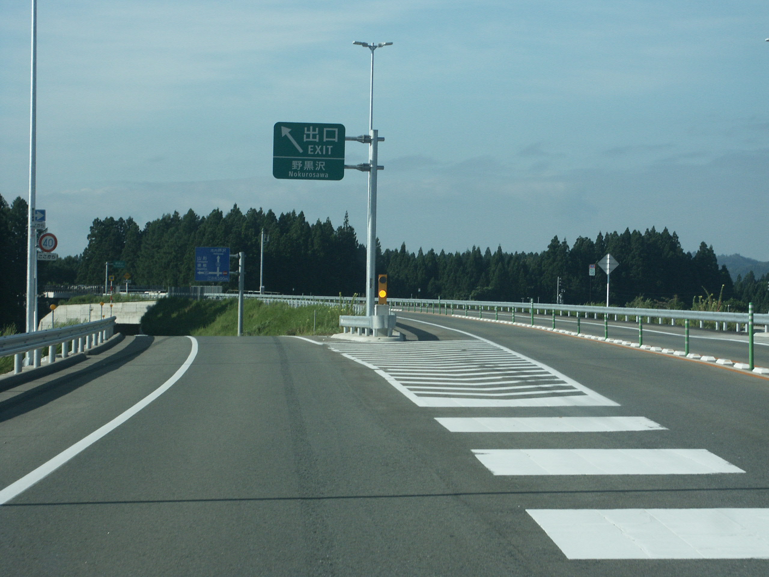 東北中央自動車道（尾花沢新庄道路）野黒沢IC出口（新庄IC方面側）